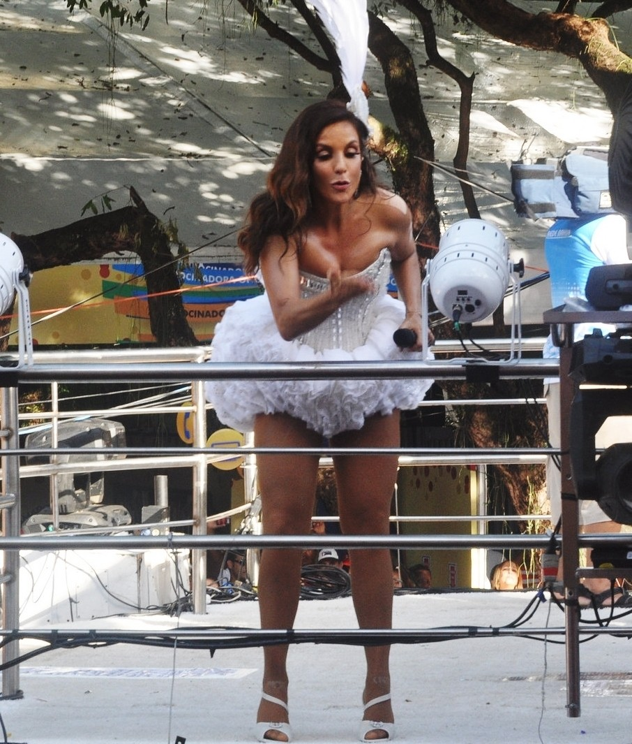 Ivete Sangalo no Carnaval de 2014 em Salvador.